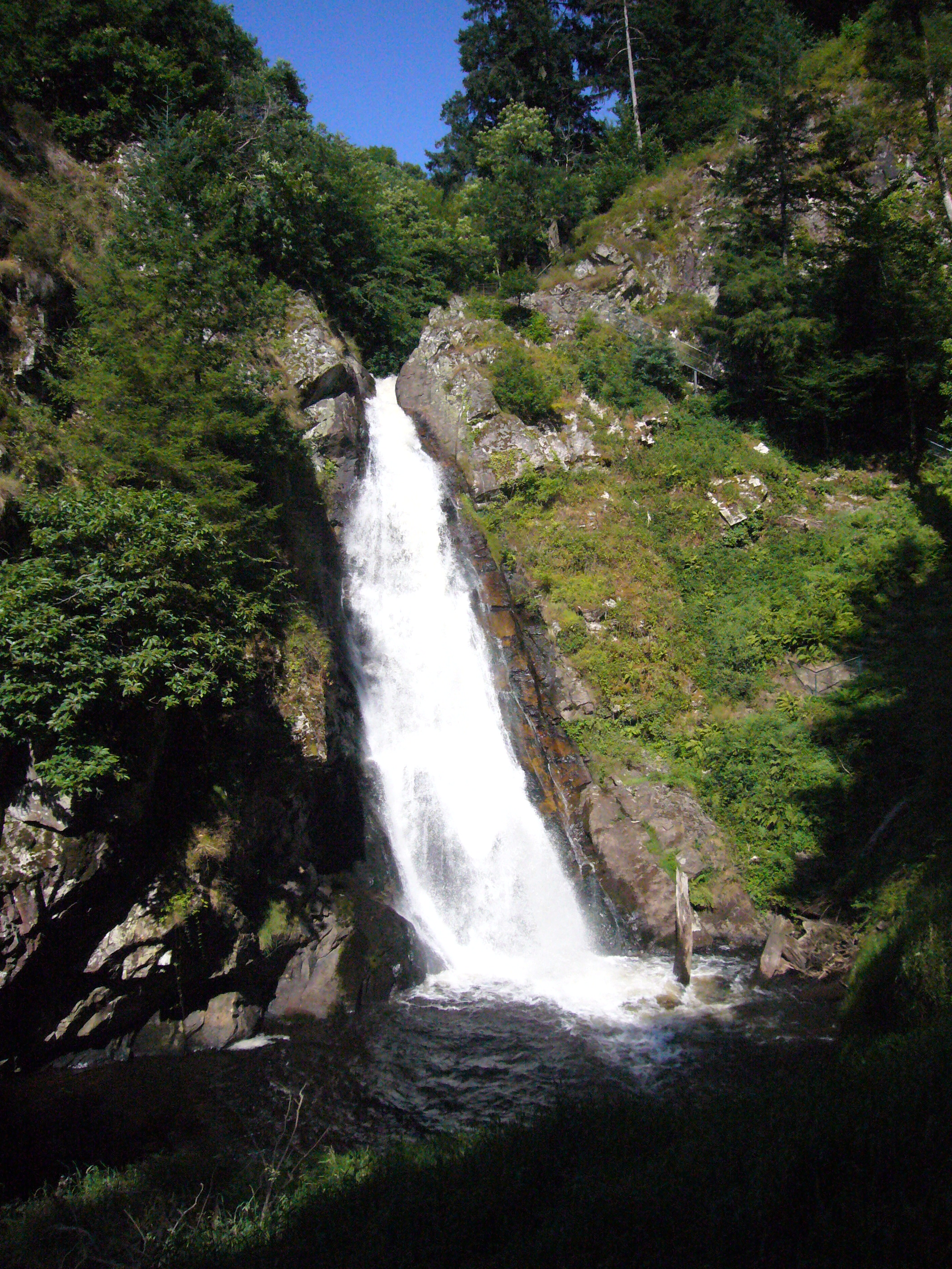 La Queue de cheval, la plus haute des cascades de Gimel (Gimel-les-Cascades, Corrèze, France)